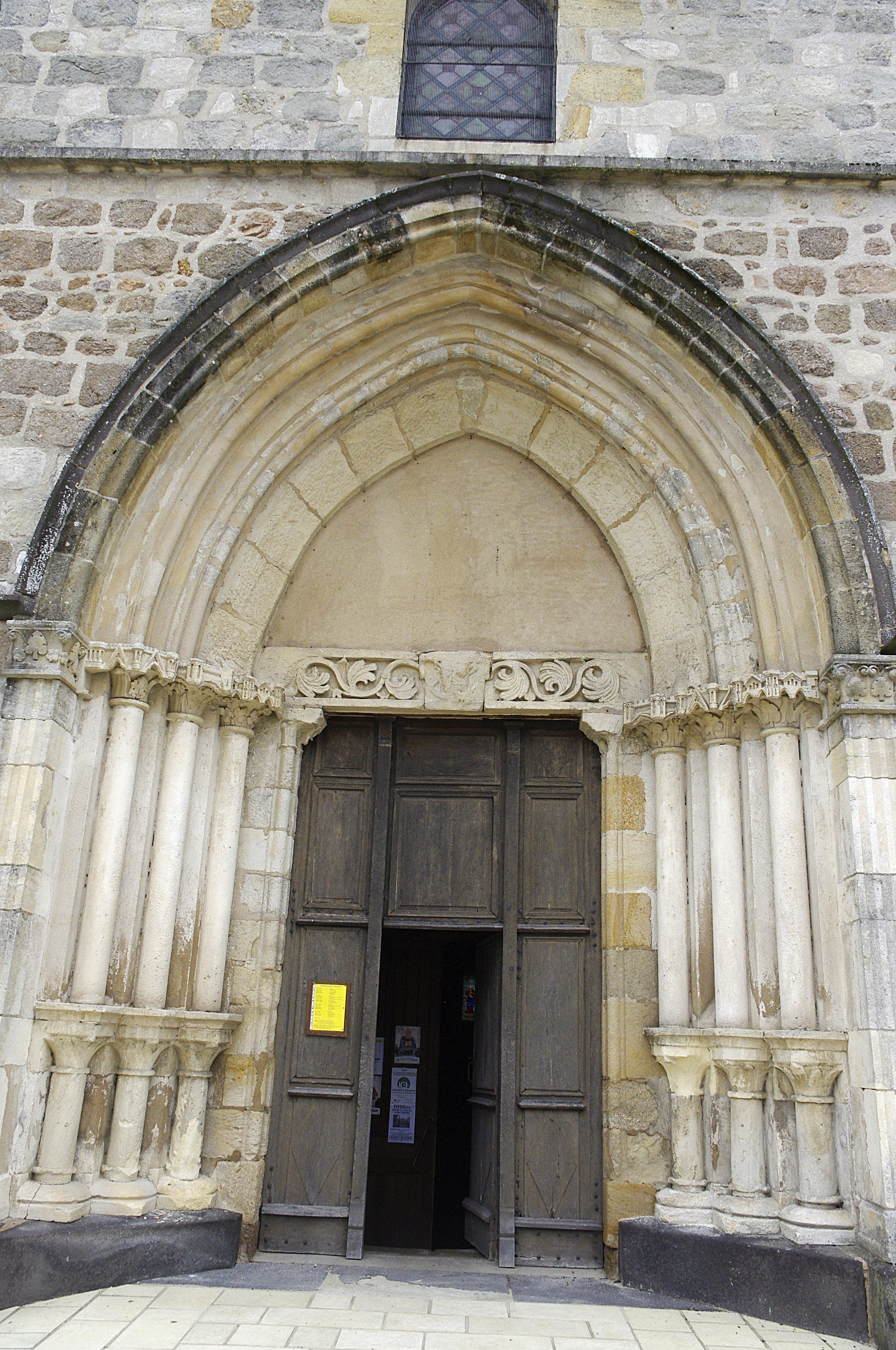 L'église Saint Étienne à Montmarault, Allier, France